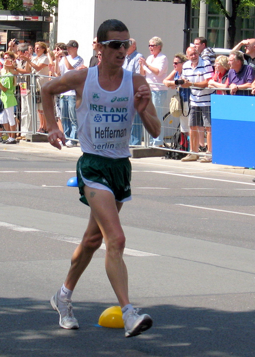 Robert Heffernan, 15.08.2009